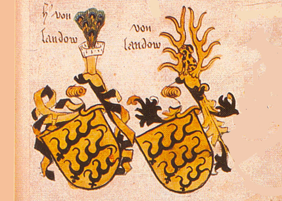 Ingeram-Codex der ehemaligen Bibliothek Cotta h(err von/landow von/landow